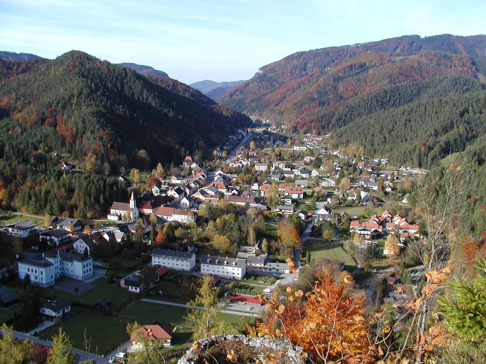 Blick von der Ruine über Hohenberg